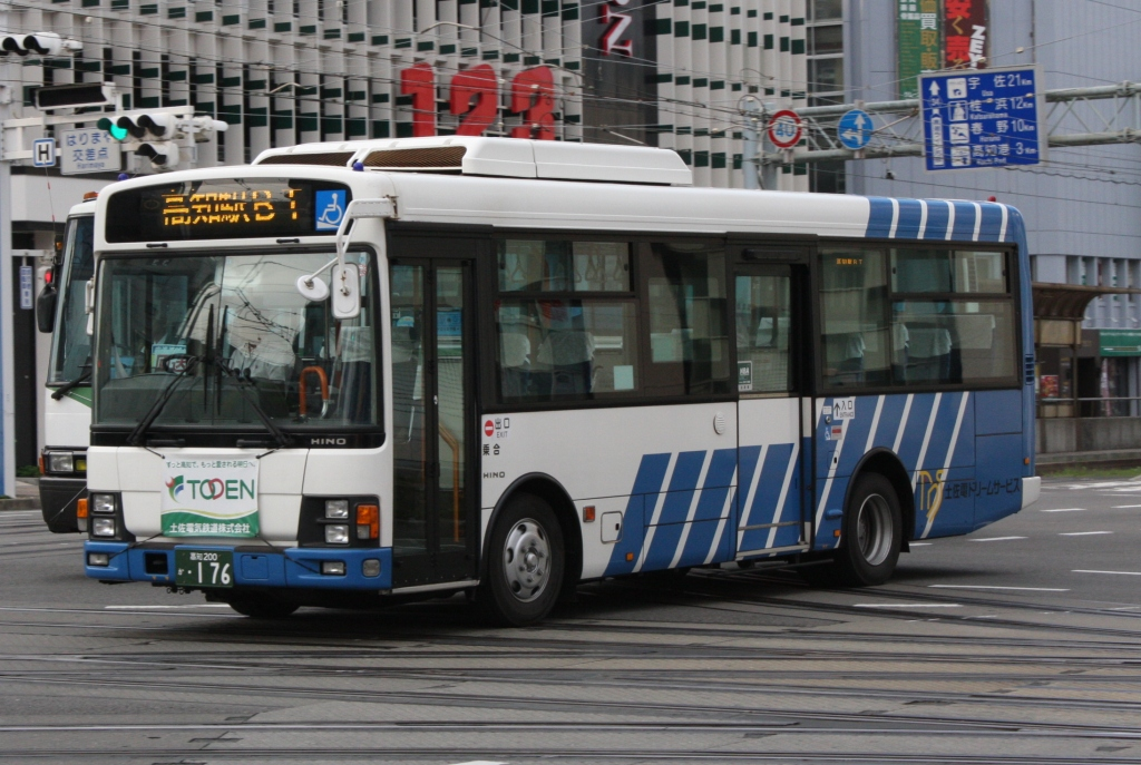 土佐電ドリームサービスの新塗装車